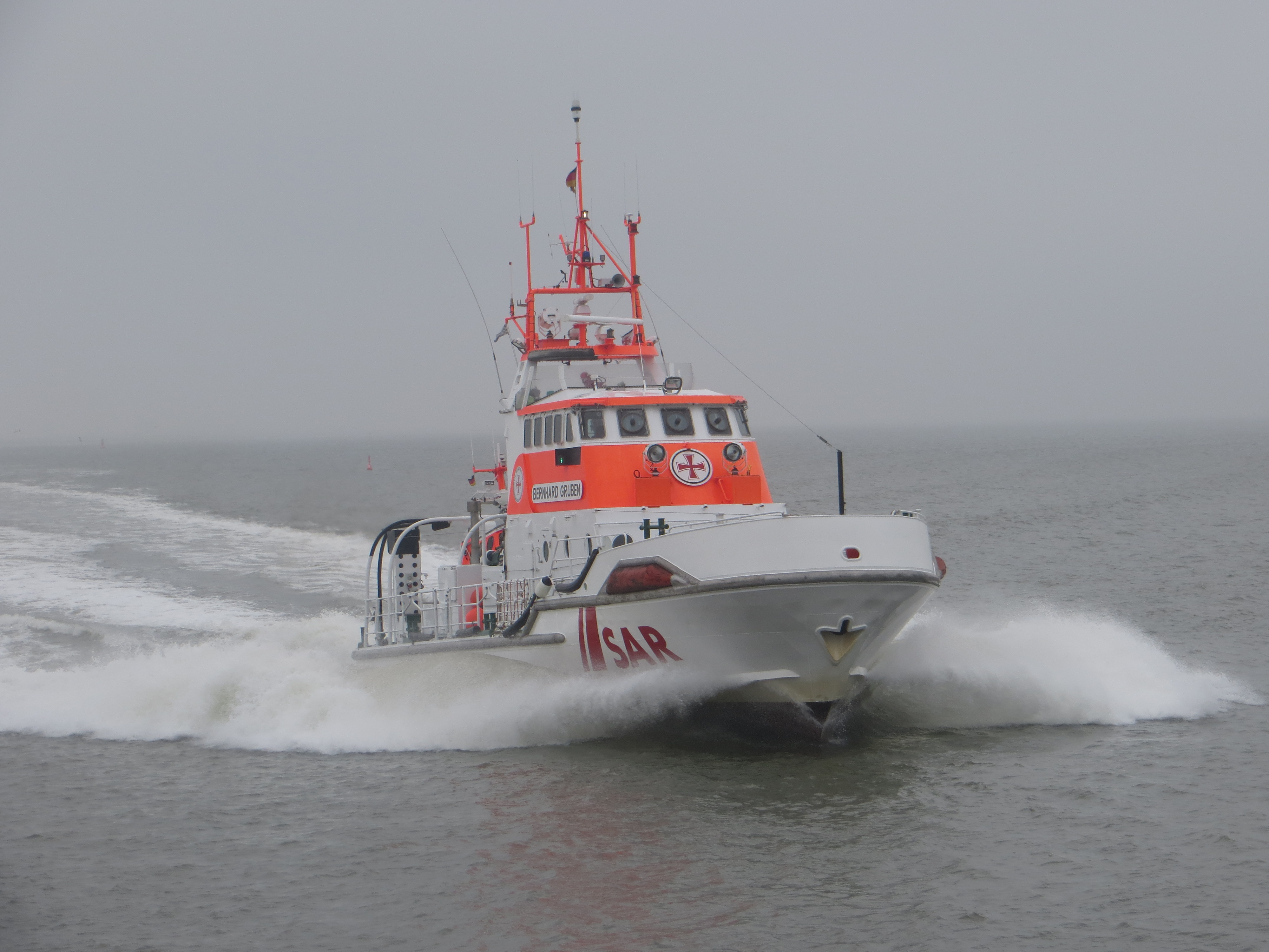 Die Seenotrettungskreuzer Bernhard Gruben während der Fahrt.